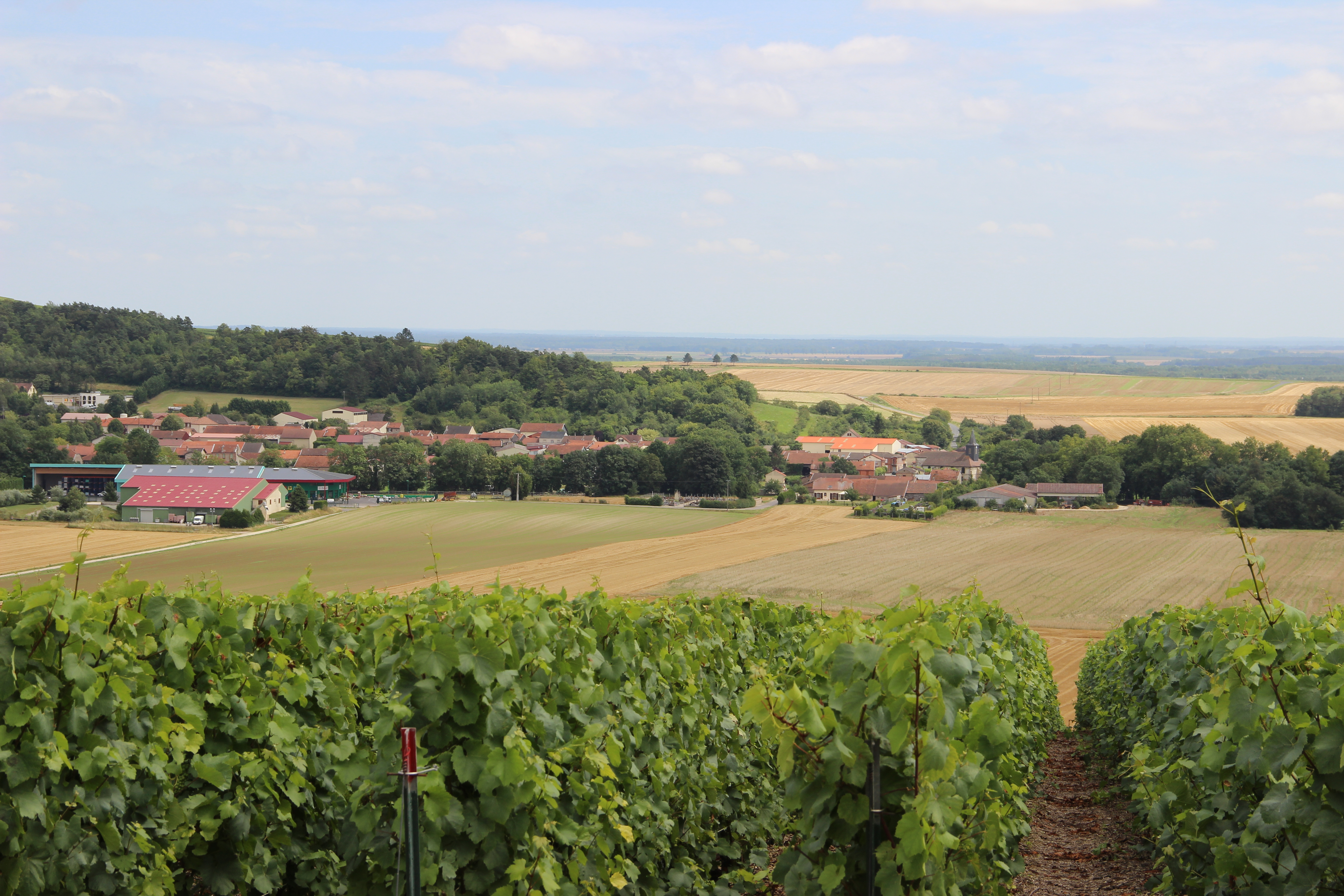 Vue du vignoble et du village